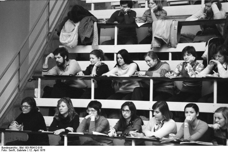 ADN-ZB/Senft/12.4.76 Berlin: Medizinstudenten Vorlesung im Fach Chirurgie in der Frauenklinik der Charité. Die Studenten des 3. Studienjahres der Grundstudienrichtung Medizin (Foto) haben Vorlesungen in den Fächern Wissenschaftlicher Kommunismus, Pathologische Anatomie, Pathophysiologie, Pathobiochemie, Mikrobiologie, Immunologie, Innere Medizin und Chirurgie. Auf zwei Stunden Vorlesung kommen eine Stunde Seminar und praktische Übungen.